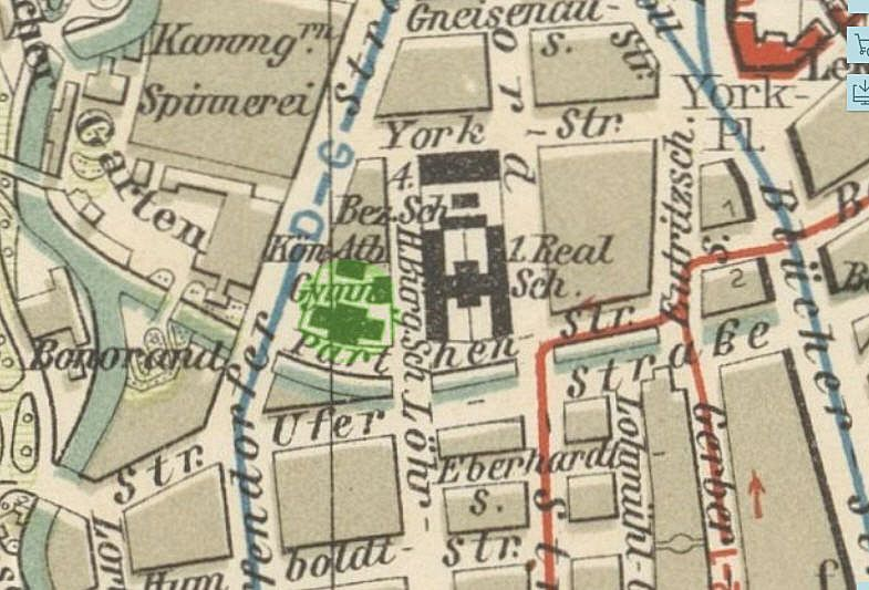 Lage des König-Albert-Gymnasiums Leipzig auf einem Plan von 1914